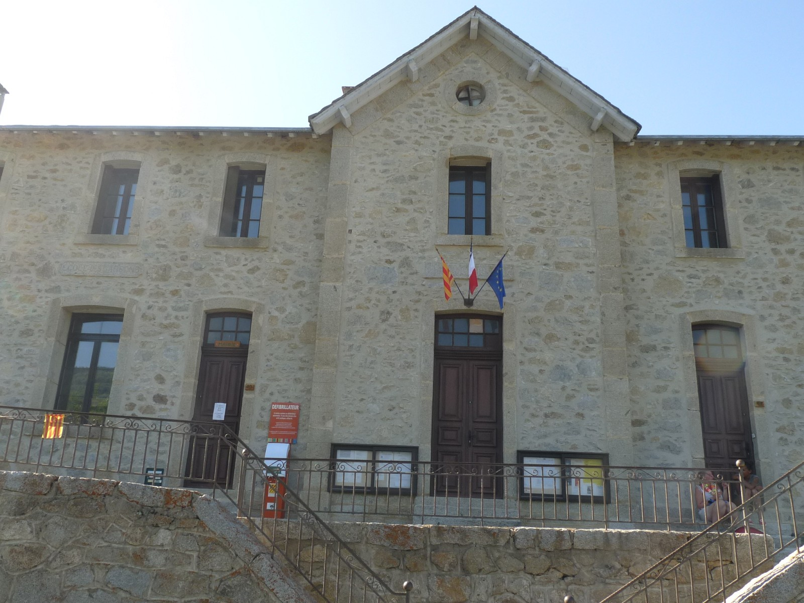 Mairie d' Ayguatébia, Pyrénées-Orientales, France